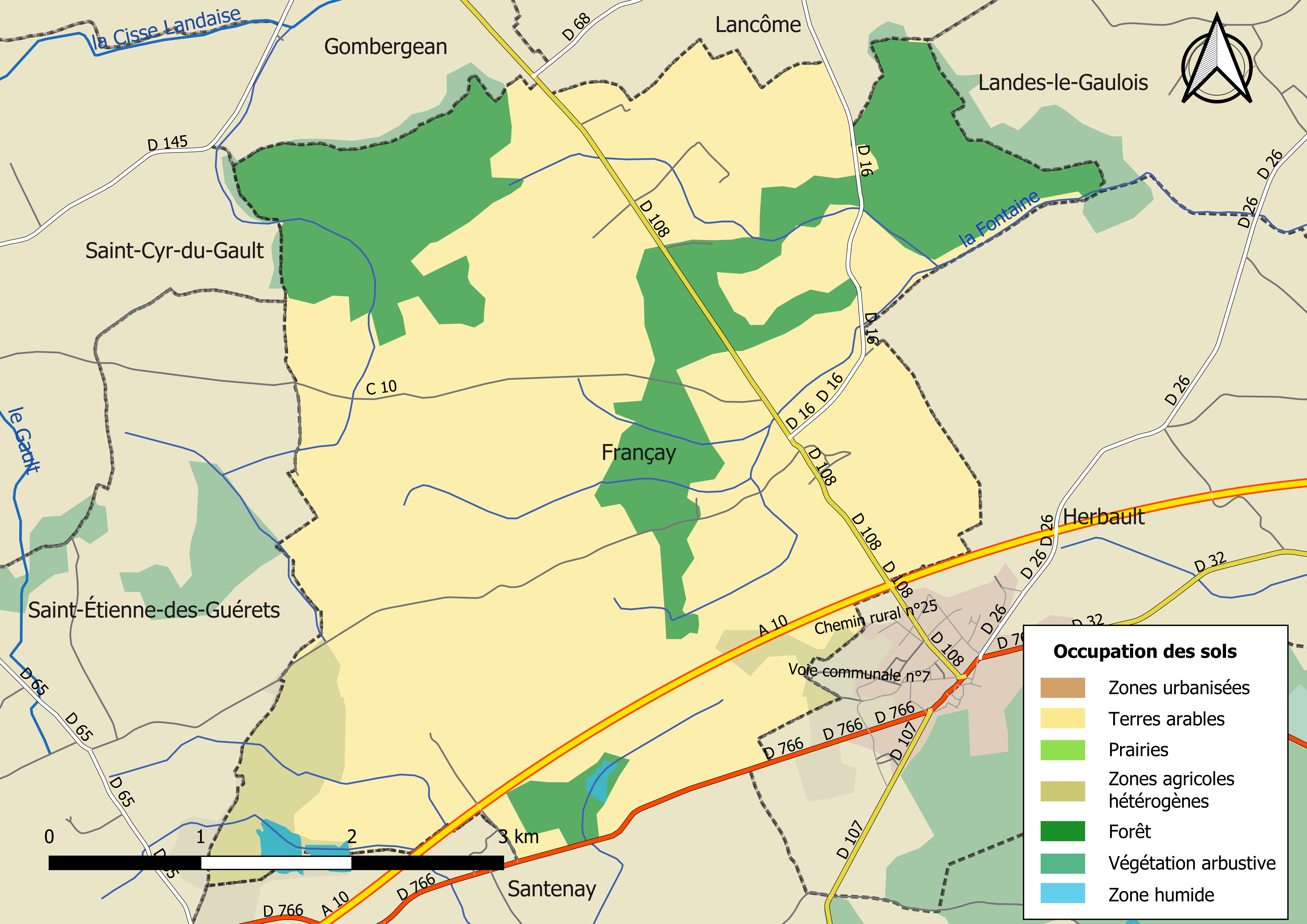 Carte des infrastructures et de l’occupation des sols en 2018 de la commune de Françay (France).